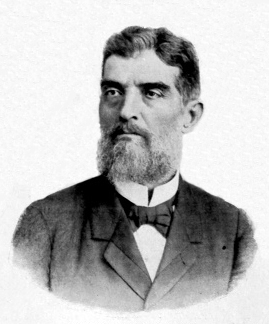 Após o fim do seu mandato, o ex-presidente do Brasil, Prudente de Morais no jornal "A Semana".